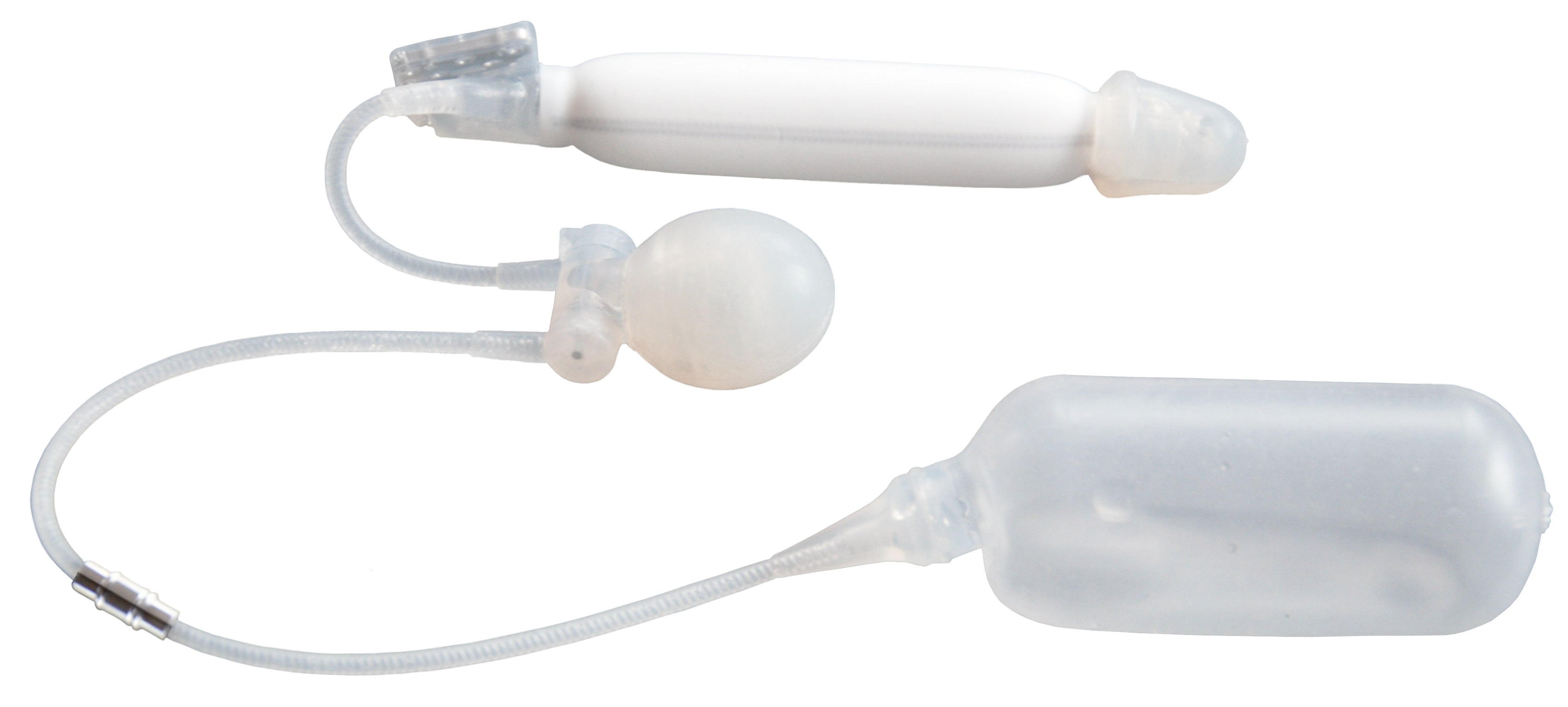 ZSI 475 FTM inflatable penile implant